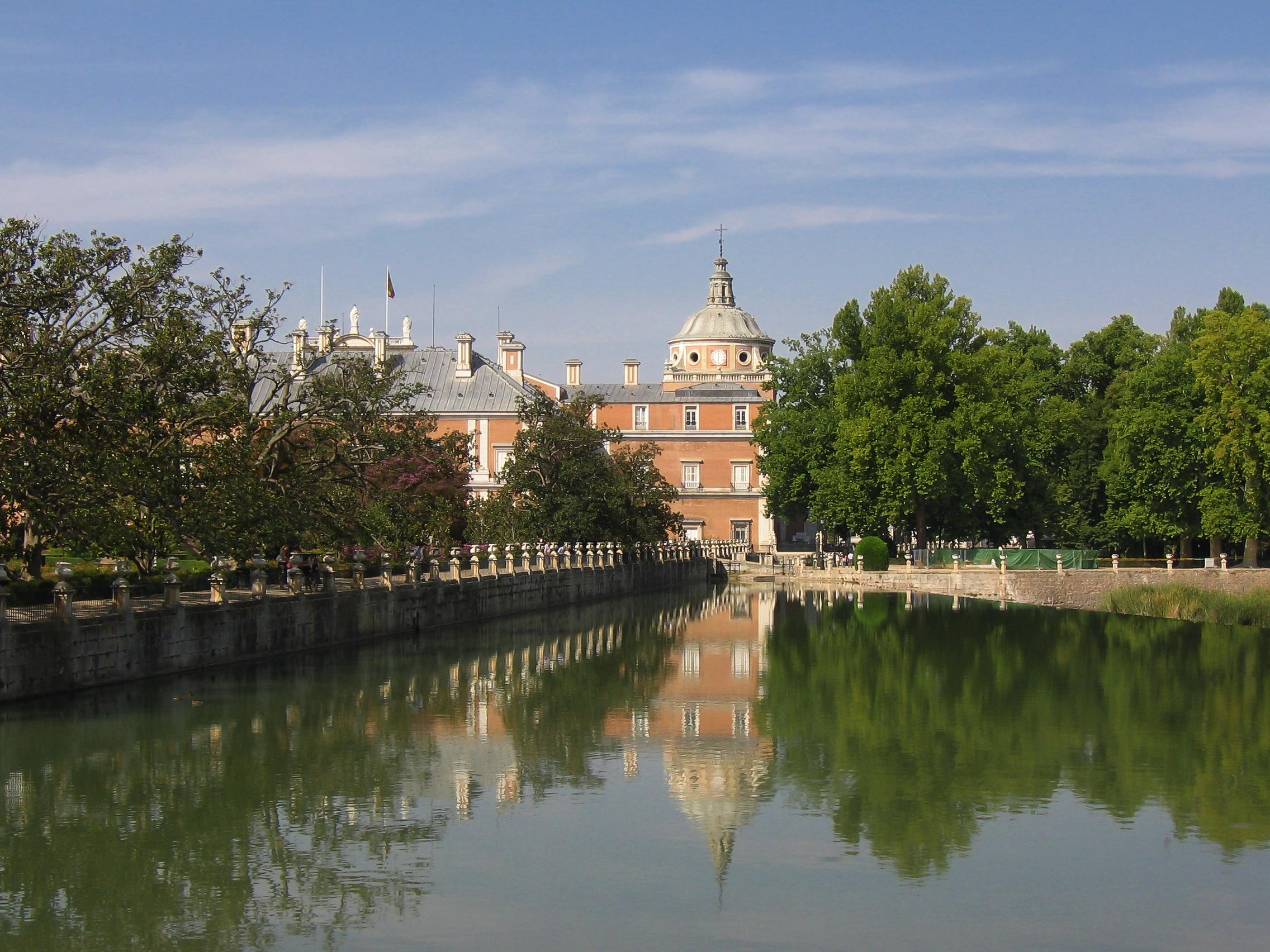 Río Tajo a su paso por Aranjuez Palacio Real de Aranjuez con el río Tajo visto desde el Puente Barcas / Royal Palace of Aranjuez with river Tagus seen from the Boats' Bridge